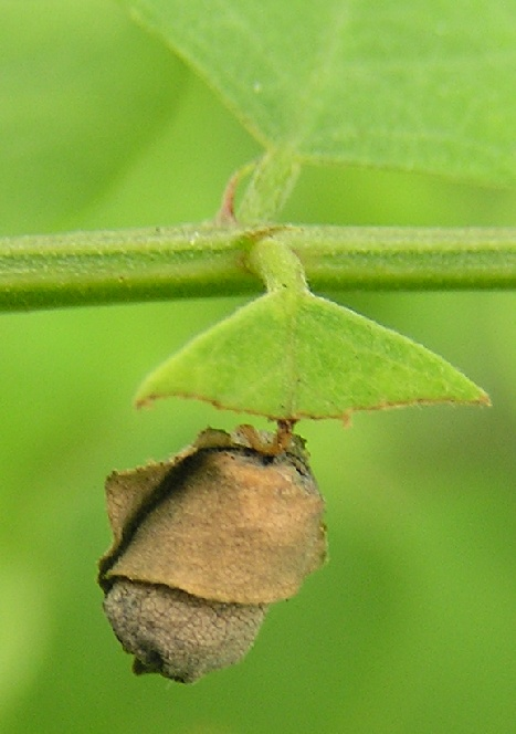 Blattwickel von Apoderus erythrogaster auf dem Fiederblatt einer Robinie an einem Straßenrand in Shiga (Japan).